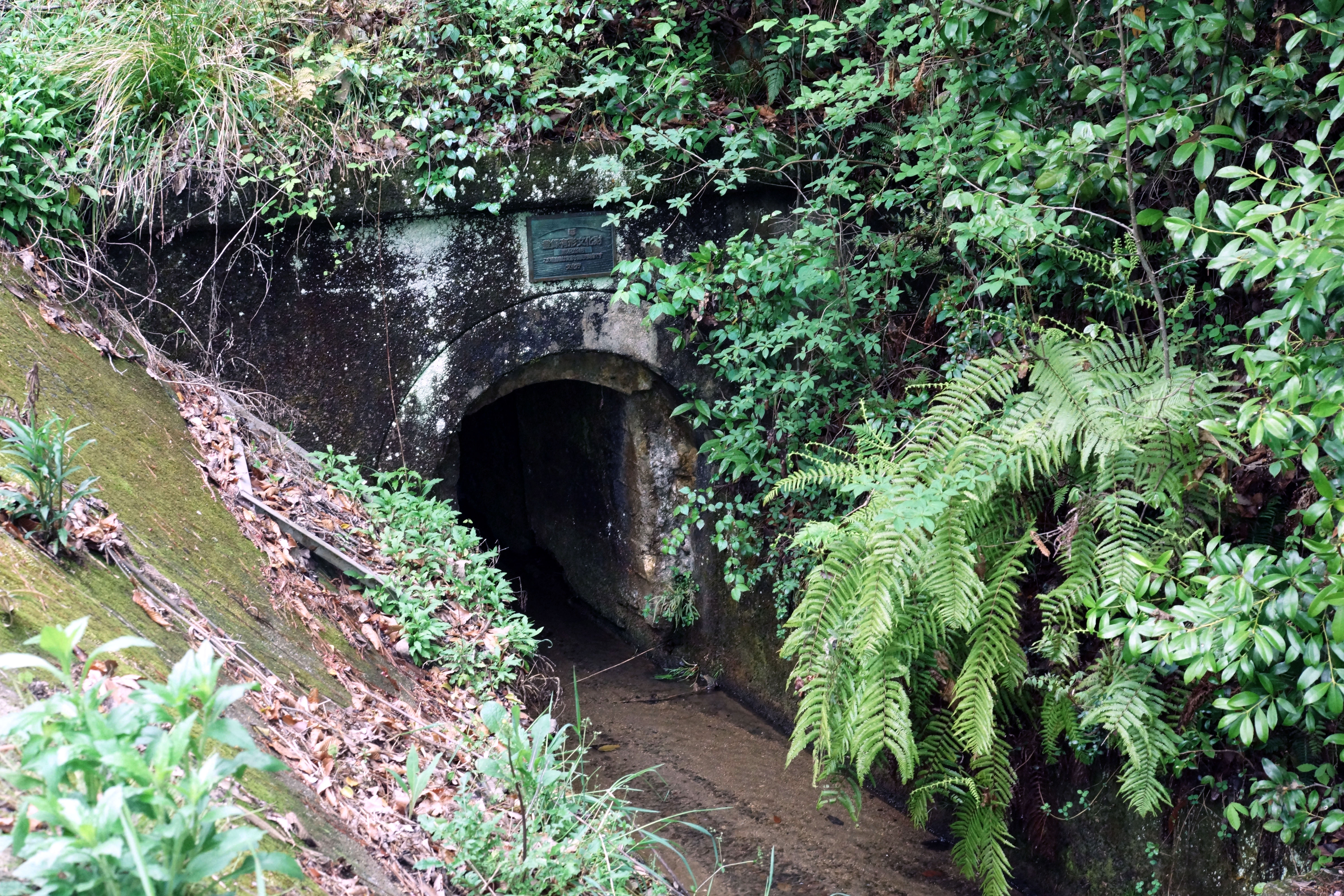 中の峠隧道 上流側の入口